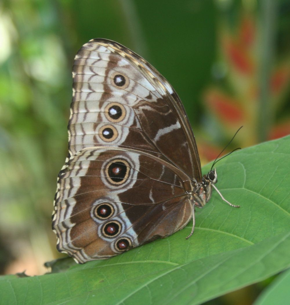 Morpho helenor marinita, Edelfalter (Nymphalidae), Morphinae - Costa Rica: Prov. Puntarenas, Hacienda Barú NW Dominical, "Butterfly Garden"